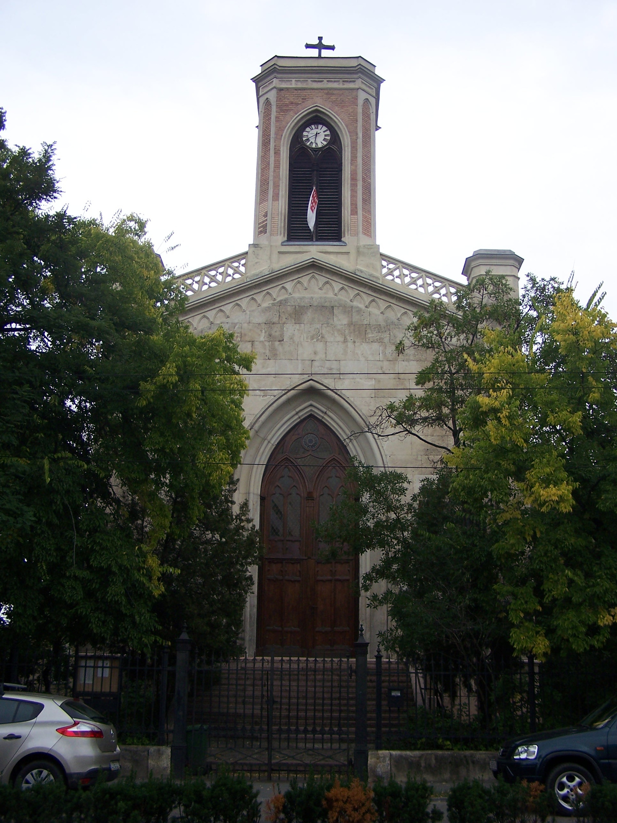 Hermina-kápolna (Budapest 14, Hermina út 23.) This is a photo of a monument in Hungary. Identifier: 1224